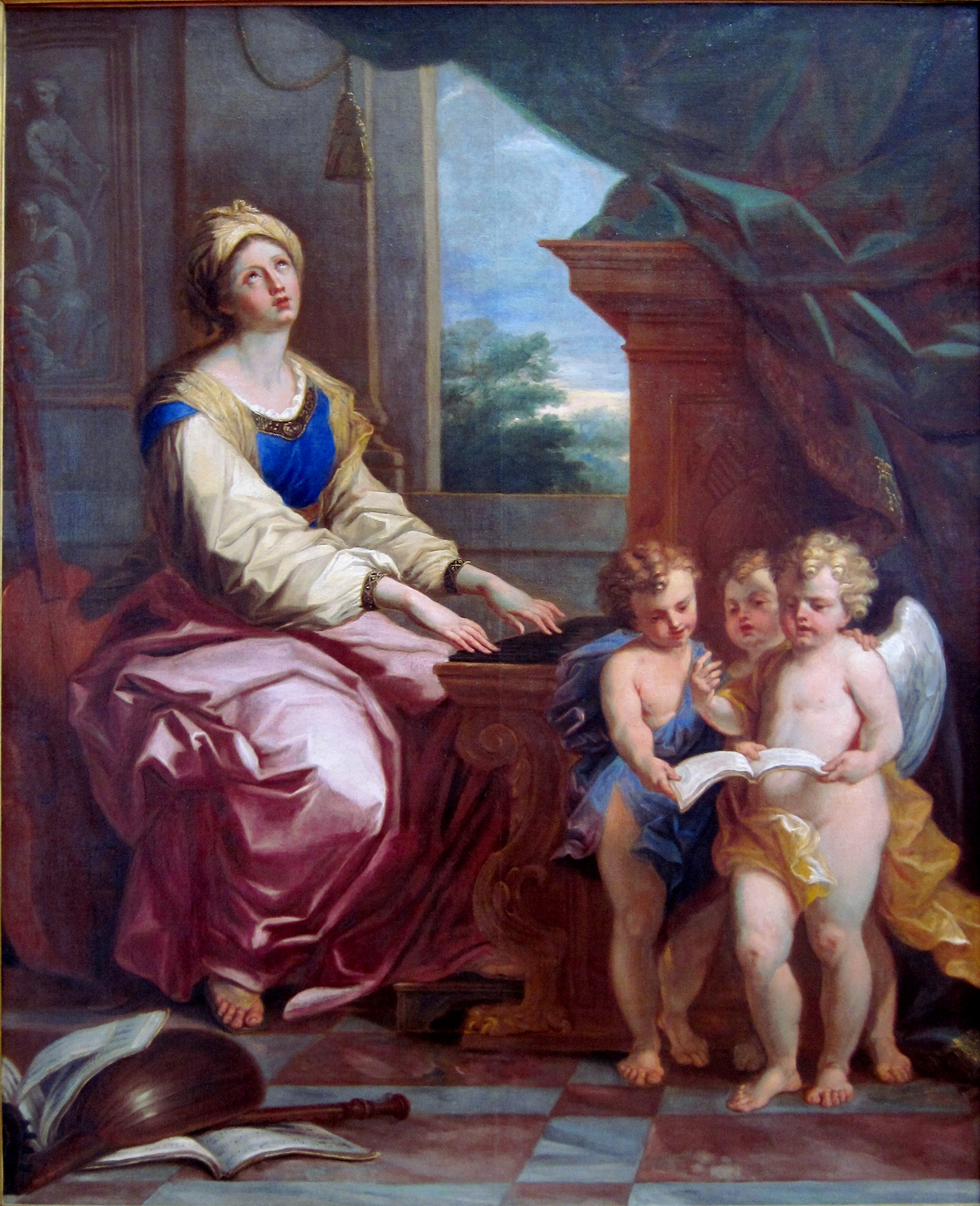 Sainte Cécile accompagnée de trois anges musiciens (peint pour l'église Saint Pierre de Lille du couvent des Récollets de Lille, rue des Arts (Lille)).